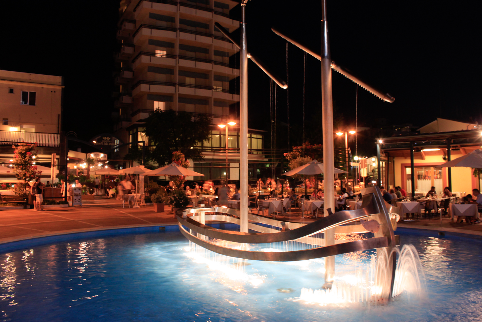 47841 Cattolica, Province of Rimini, Italy